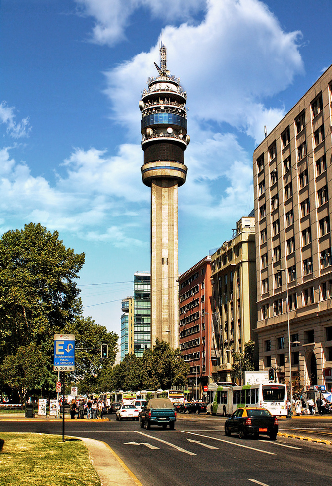 Vista de la Torre Entel desde la Alameda.